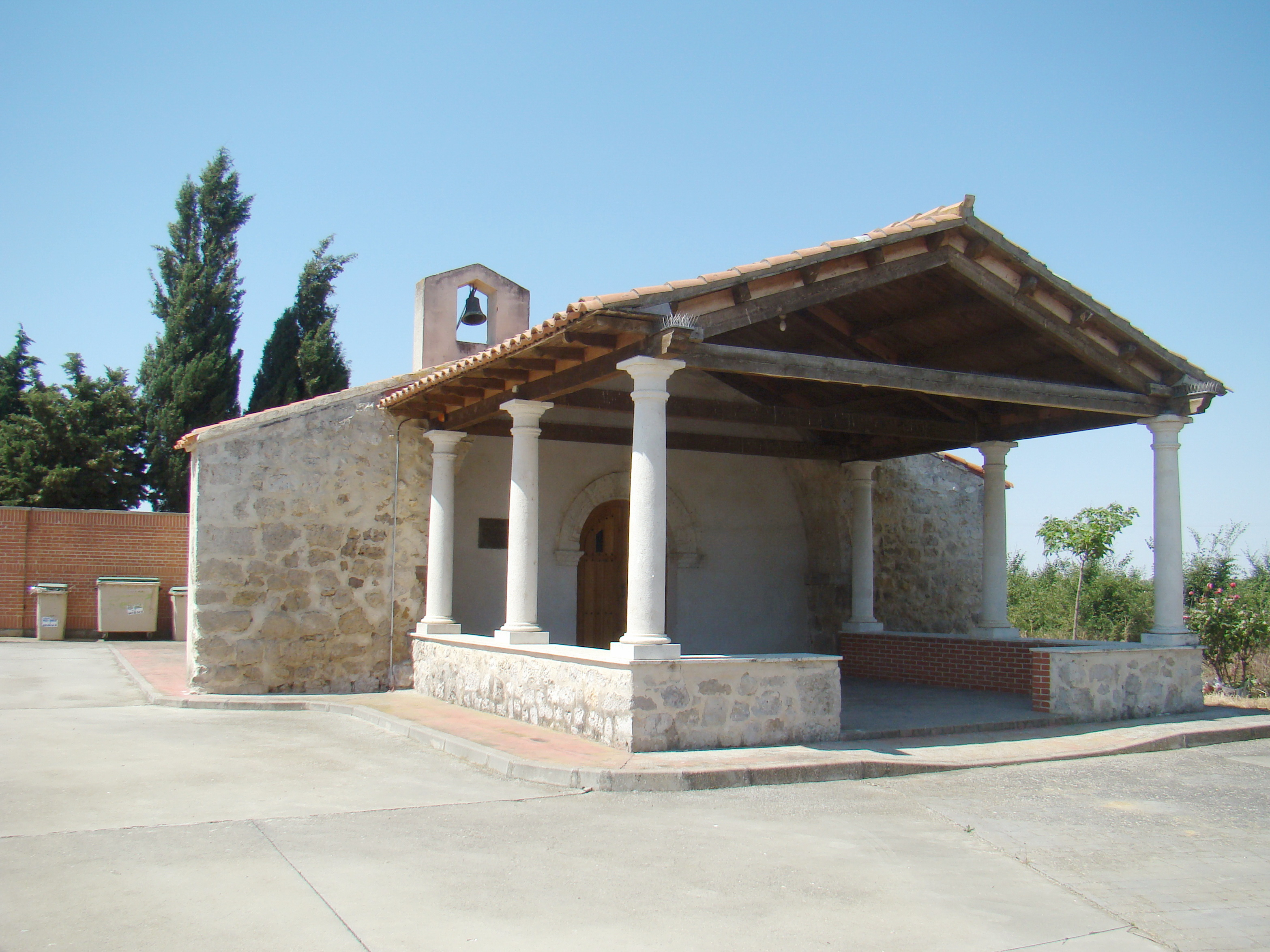 Villanueva de San Mancio en la provincia de Valladolid, España. Ermita del Humilladero.